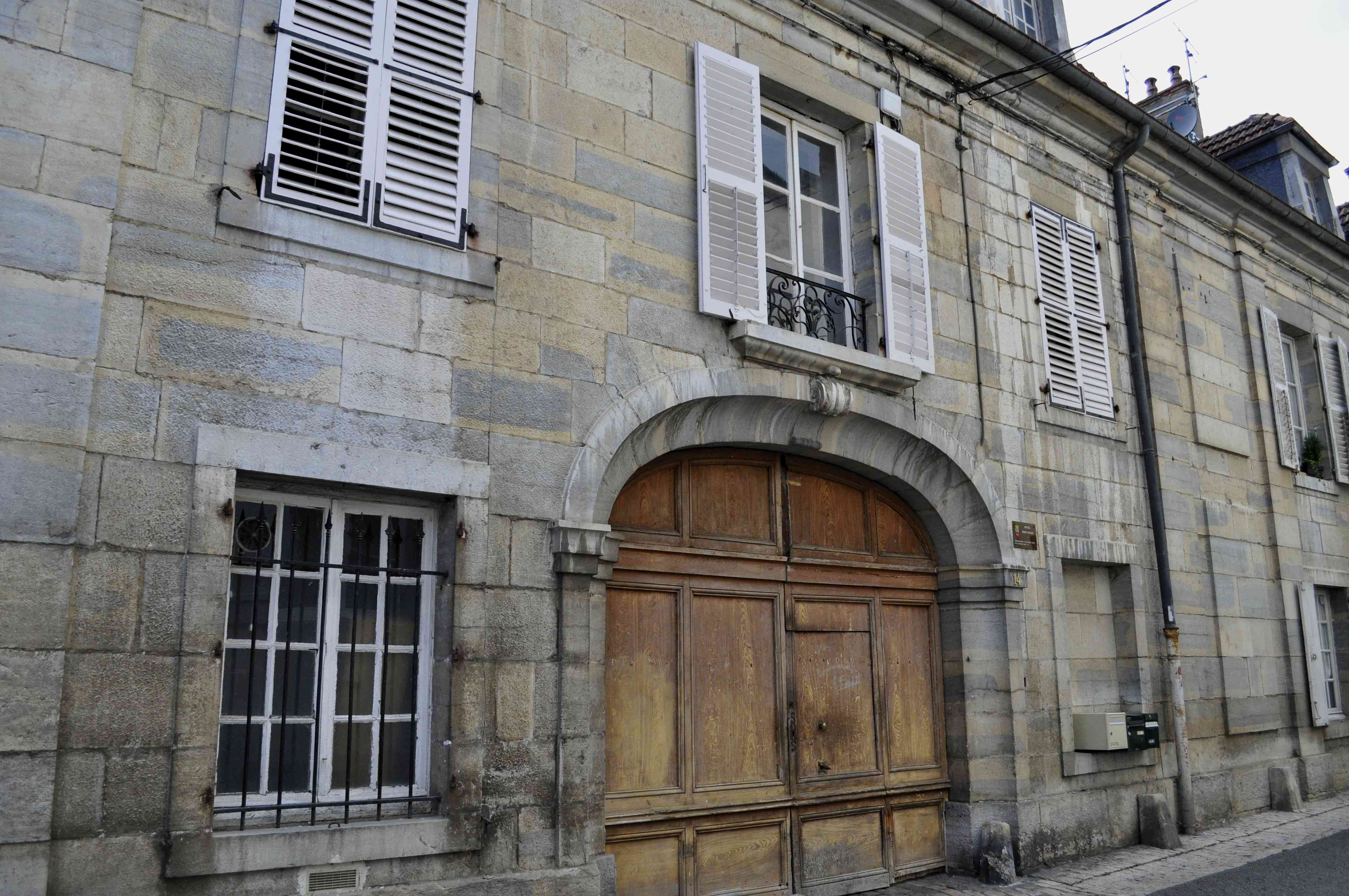 Hôtel de Simon Renard à Vesoul, 14 rue des Boucheries.